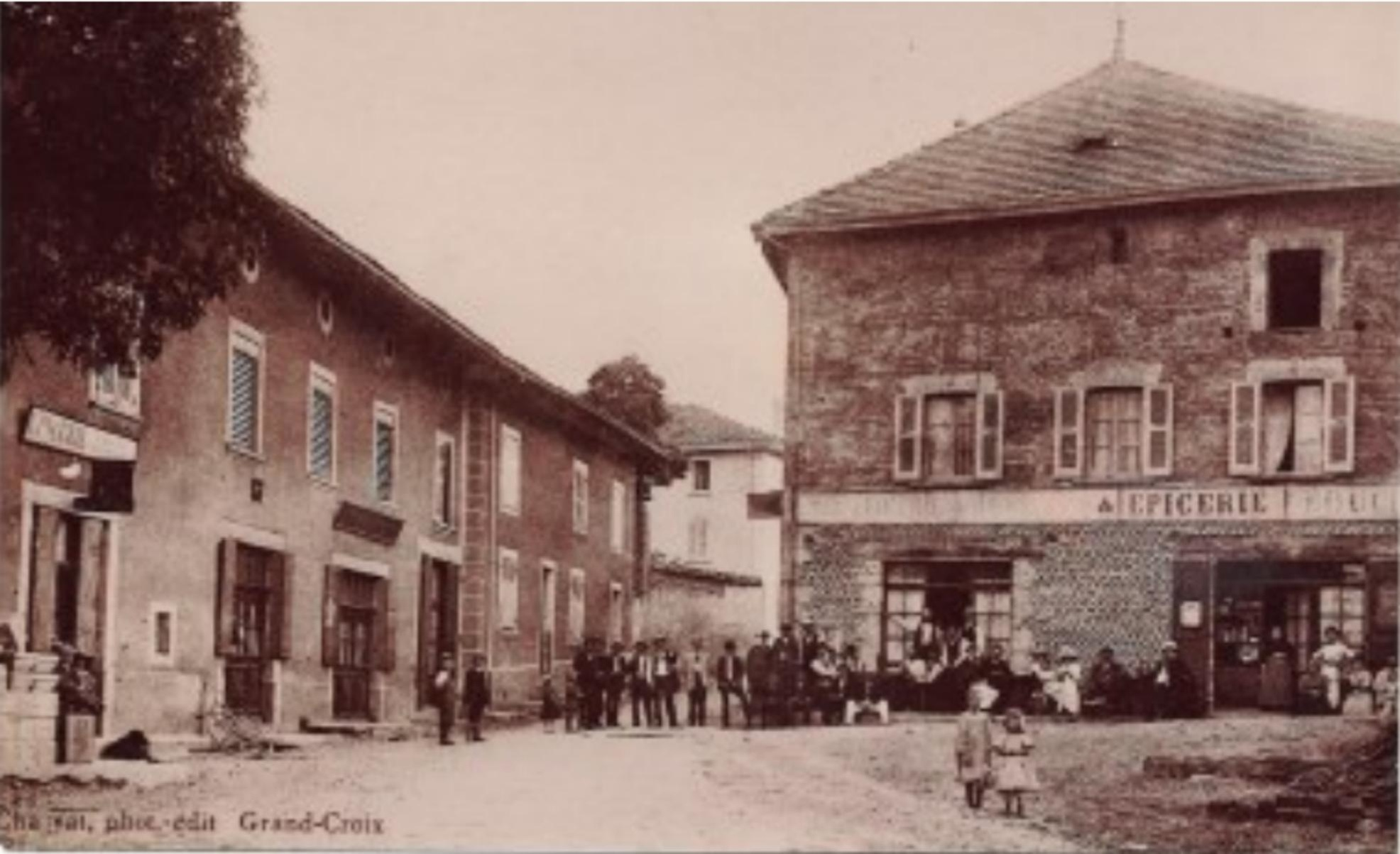 Saint-Pierre-de-Bressieux (Isère, France) : place de l'église.